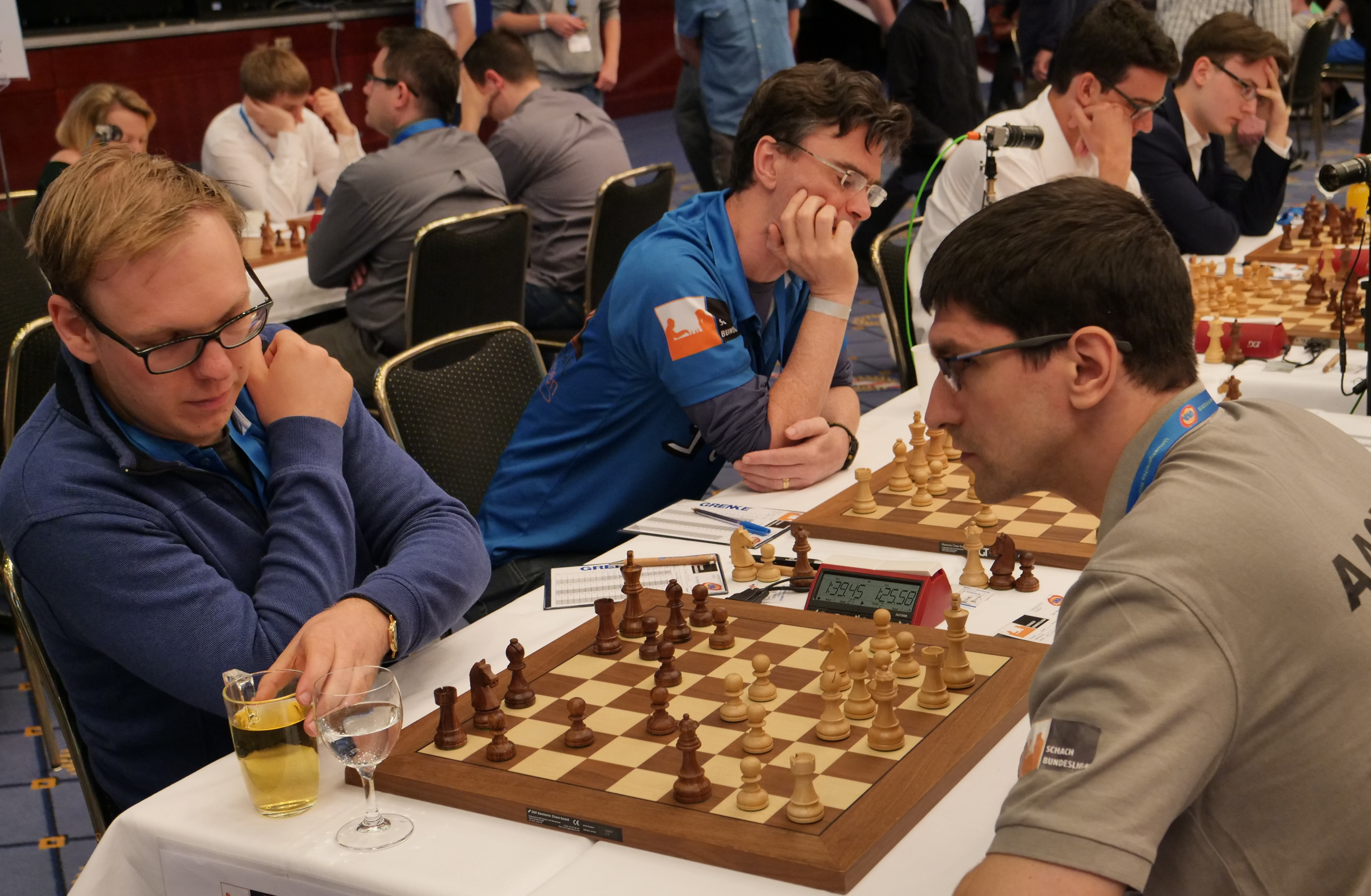 Ragger, Van Wely und Parligras - Bundesliga-Endrunde 30-4-2018